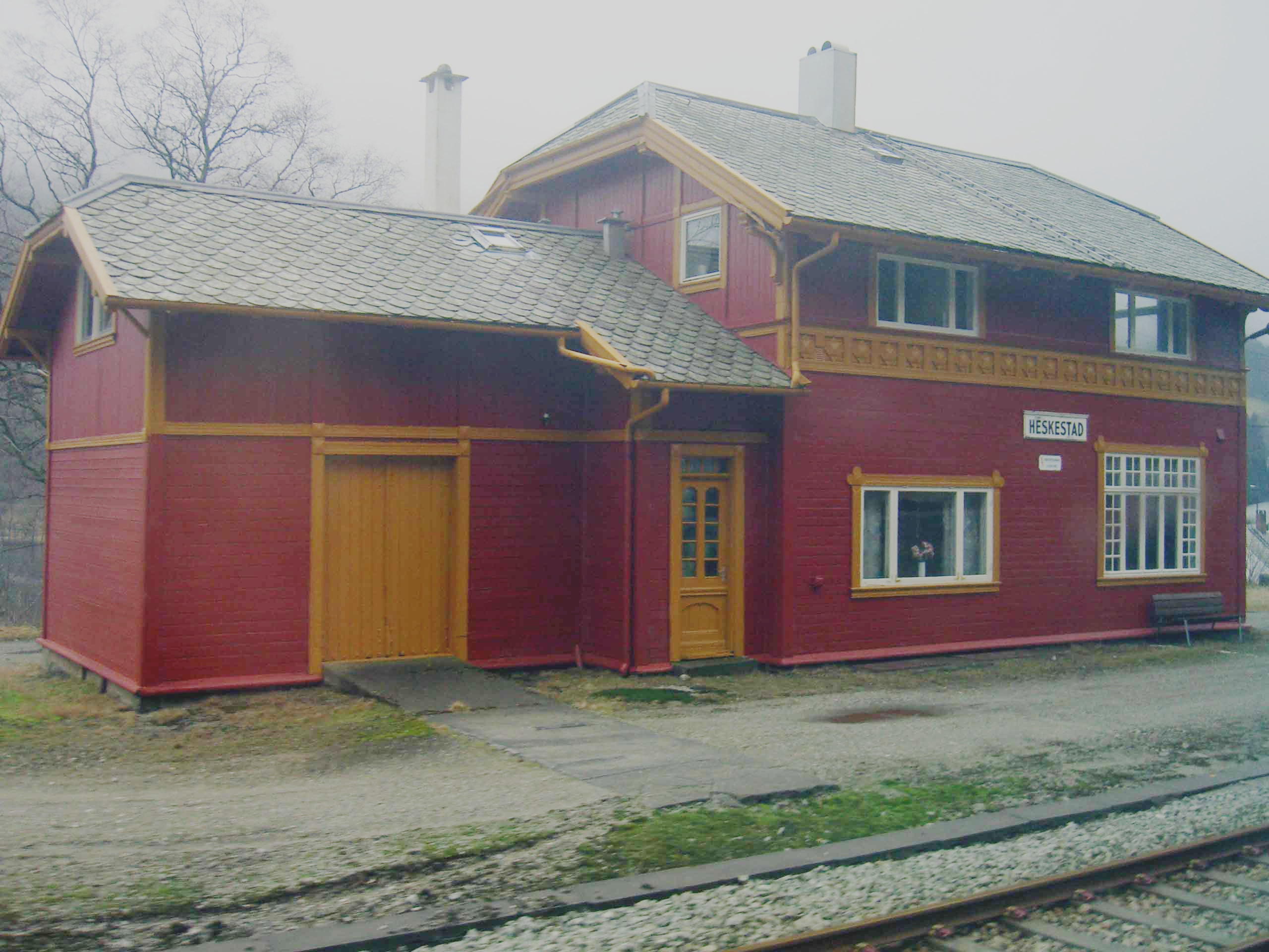 Heskestad Station on Sørlandsbanen, in Norway